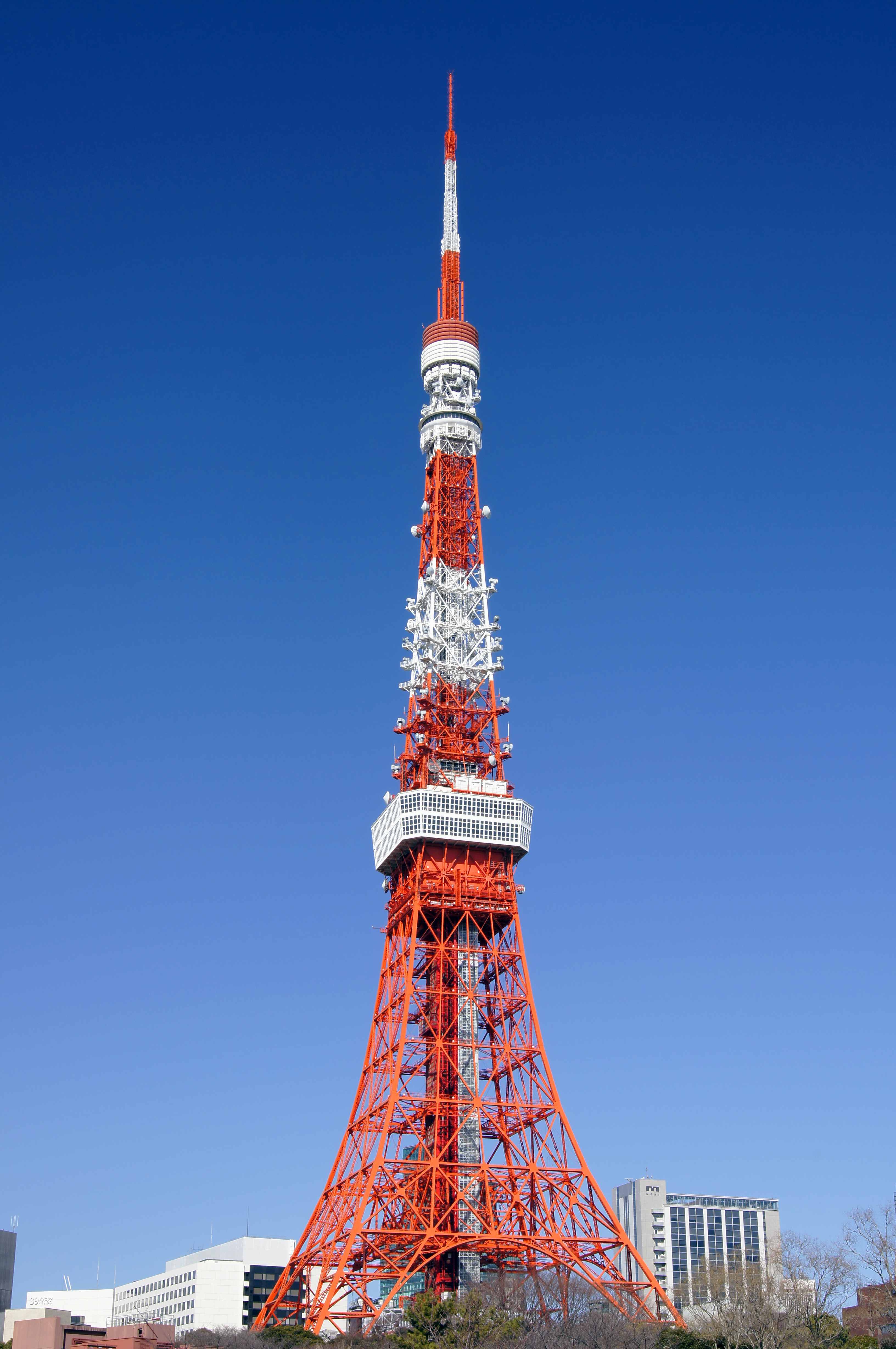 ザ・プリンス パークタワー東京敷地内より撮影